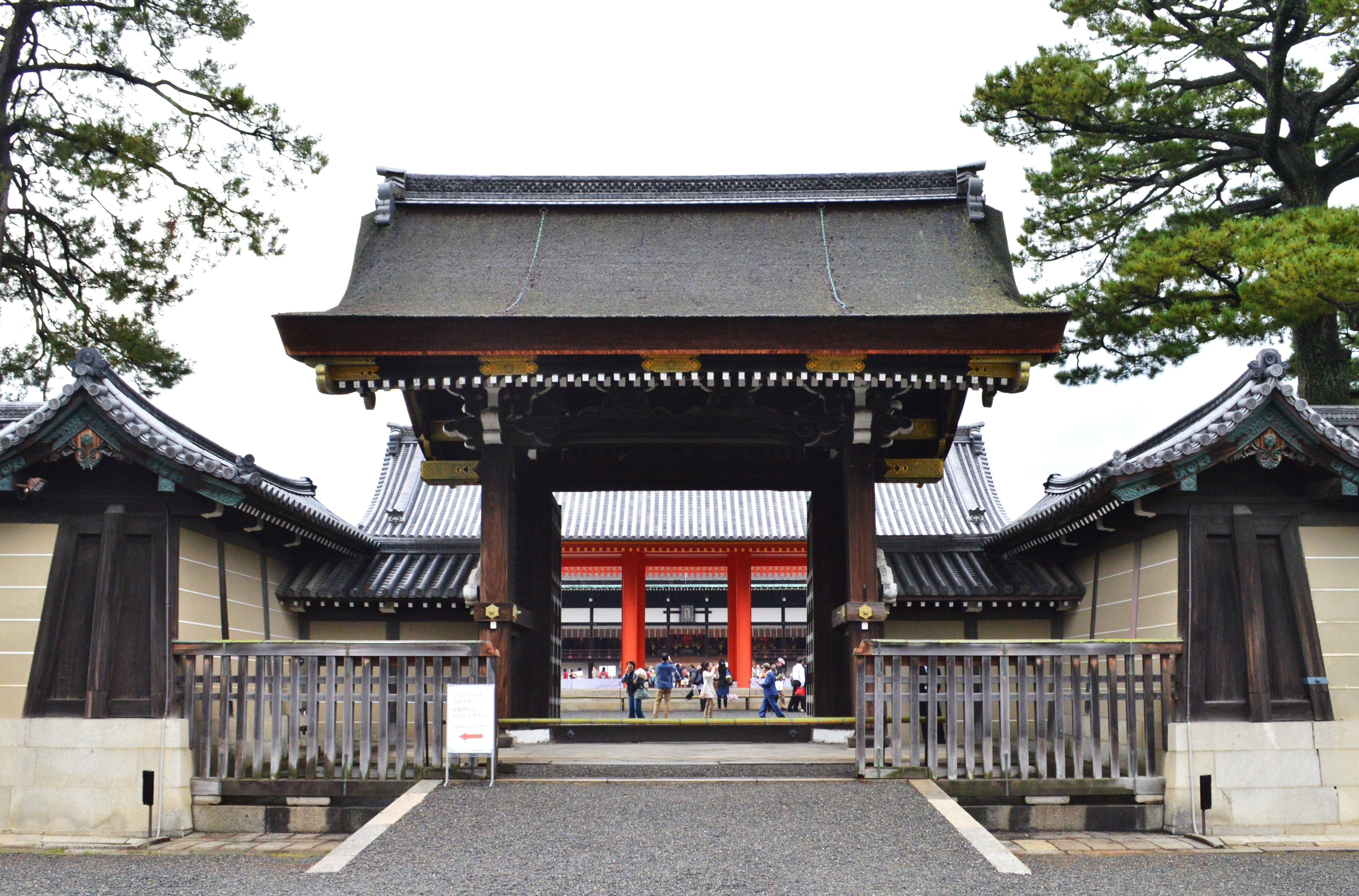 京都御所 建礼門 (開門時)